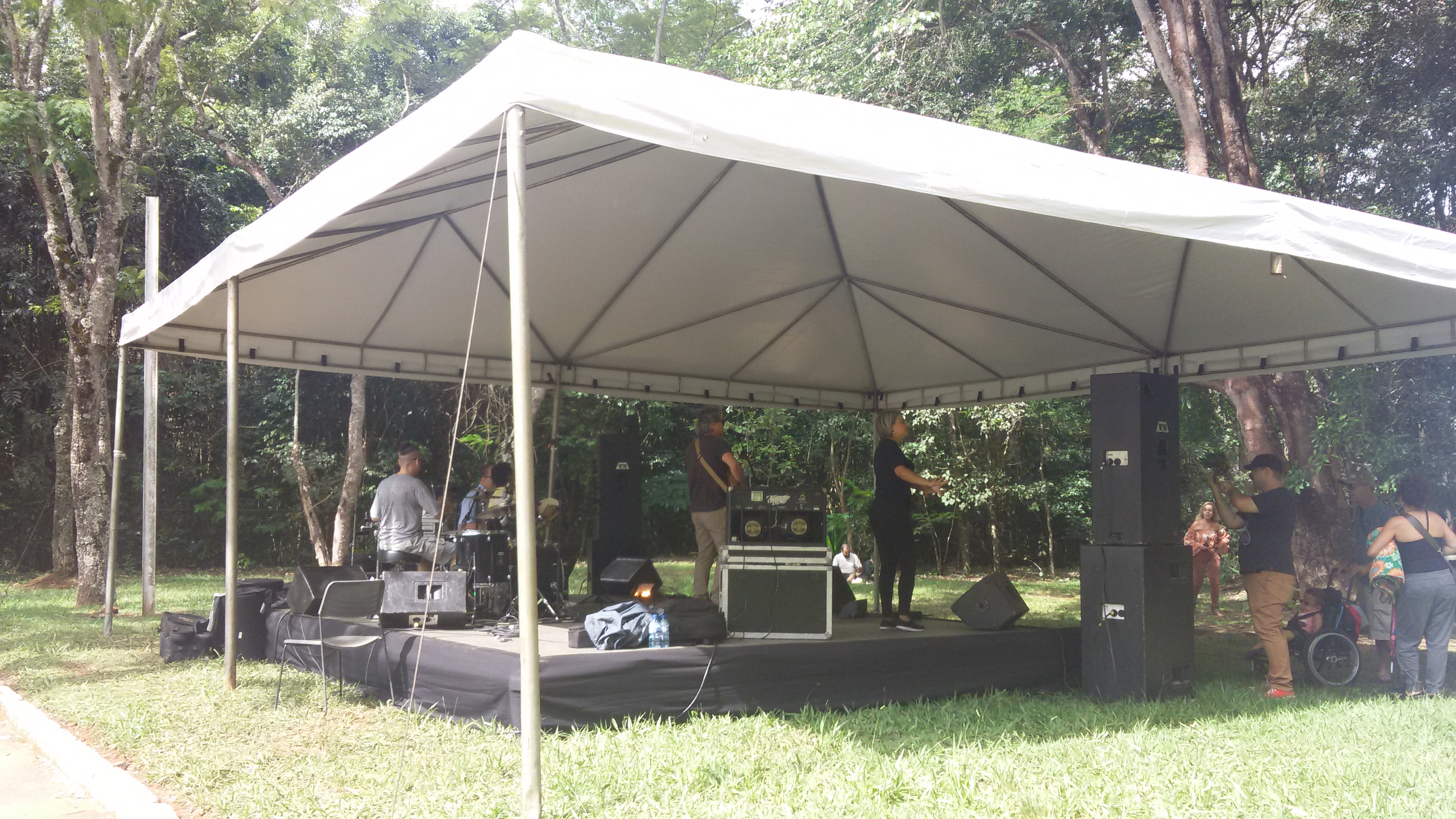 un espacio en la naturaleza donde pude oír una buena música